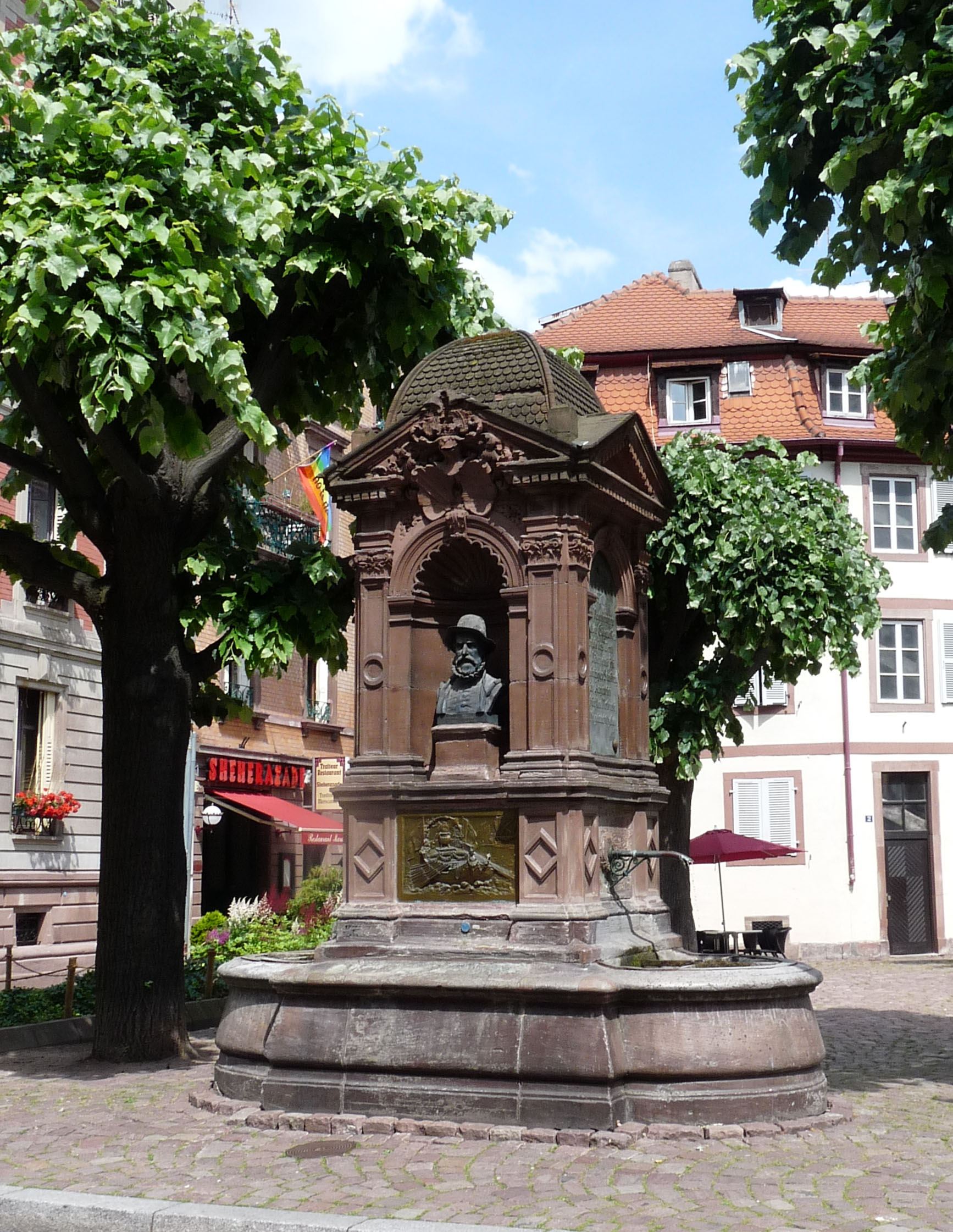 Monument aux Zurichois dans le quartier de la Krutenau à Strasbourg